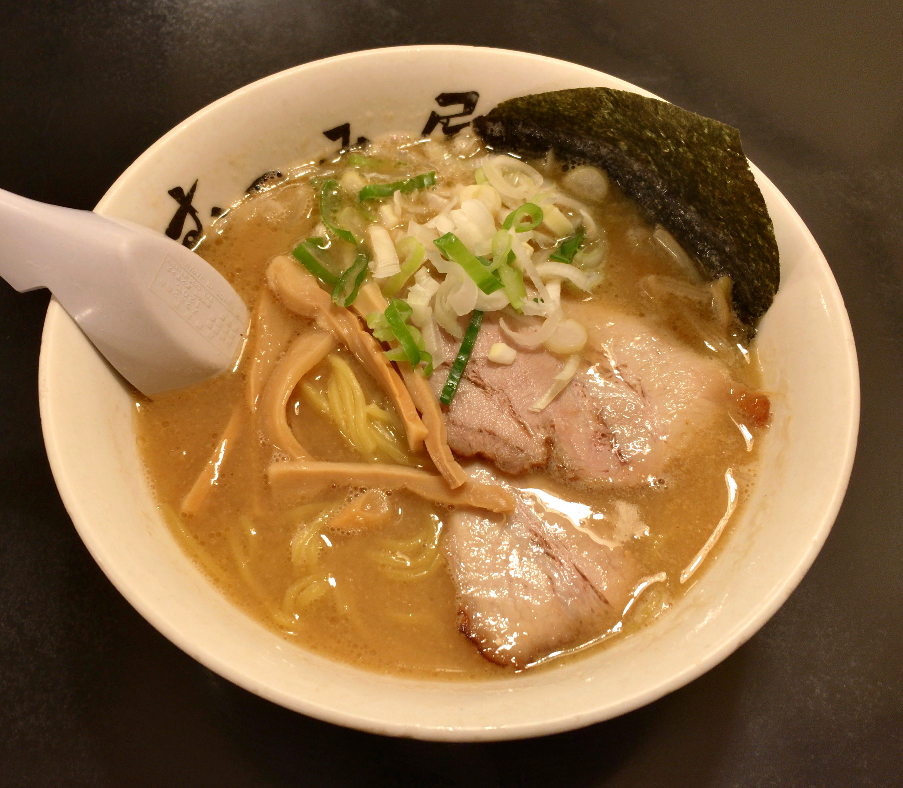 むつみ屋の白味噌らーめん